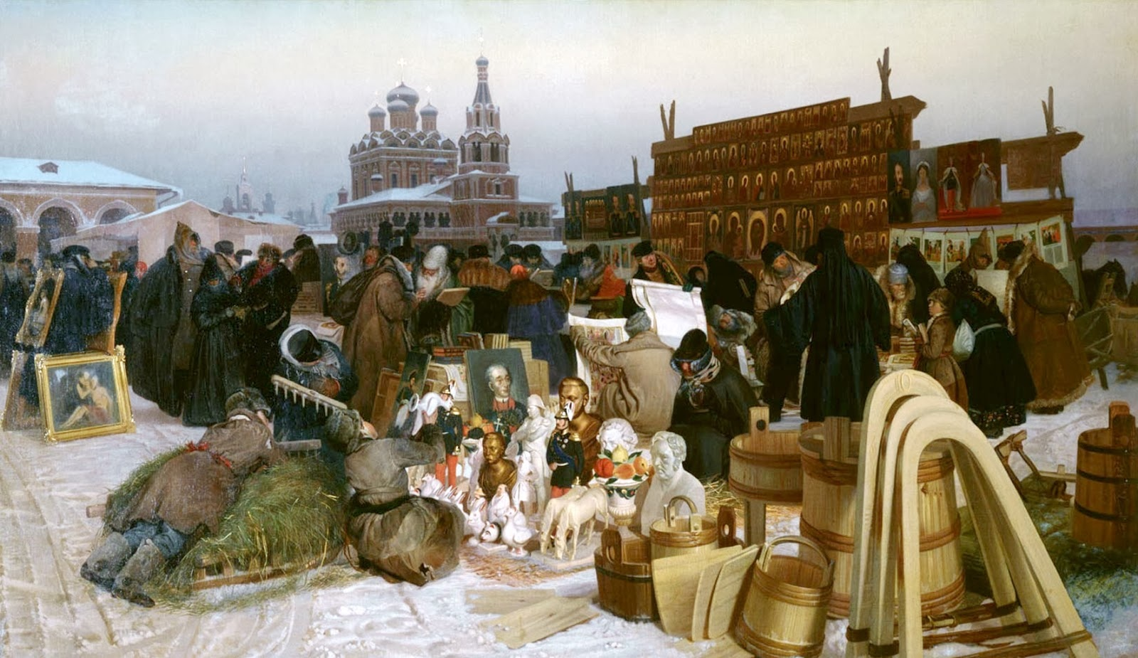 Сорокин Евграф Семенович. "Развал". 1859 - начало 1860-х (Предположительно вымышленный город. Церковь больше всего похожа на несохранившуюся церковь Николы в Столпах).